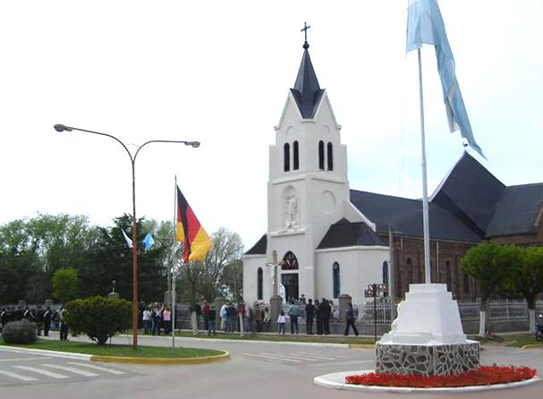 San Miguel Arcángel, Buenos Aires Province, Argentina (Volga German colony)